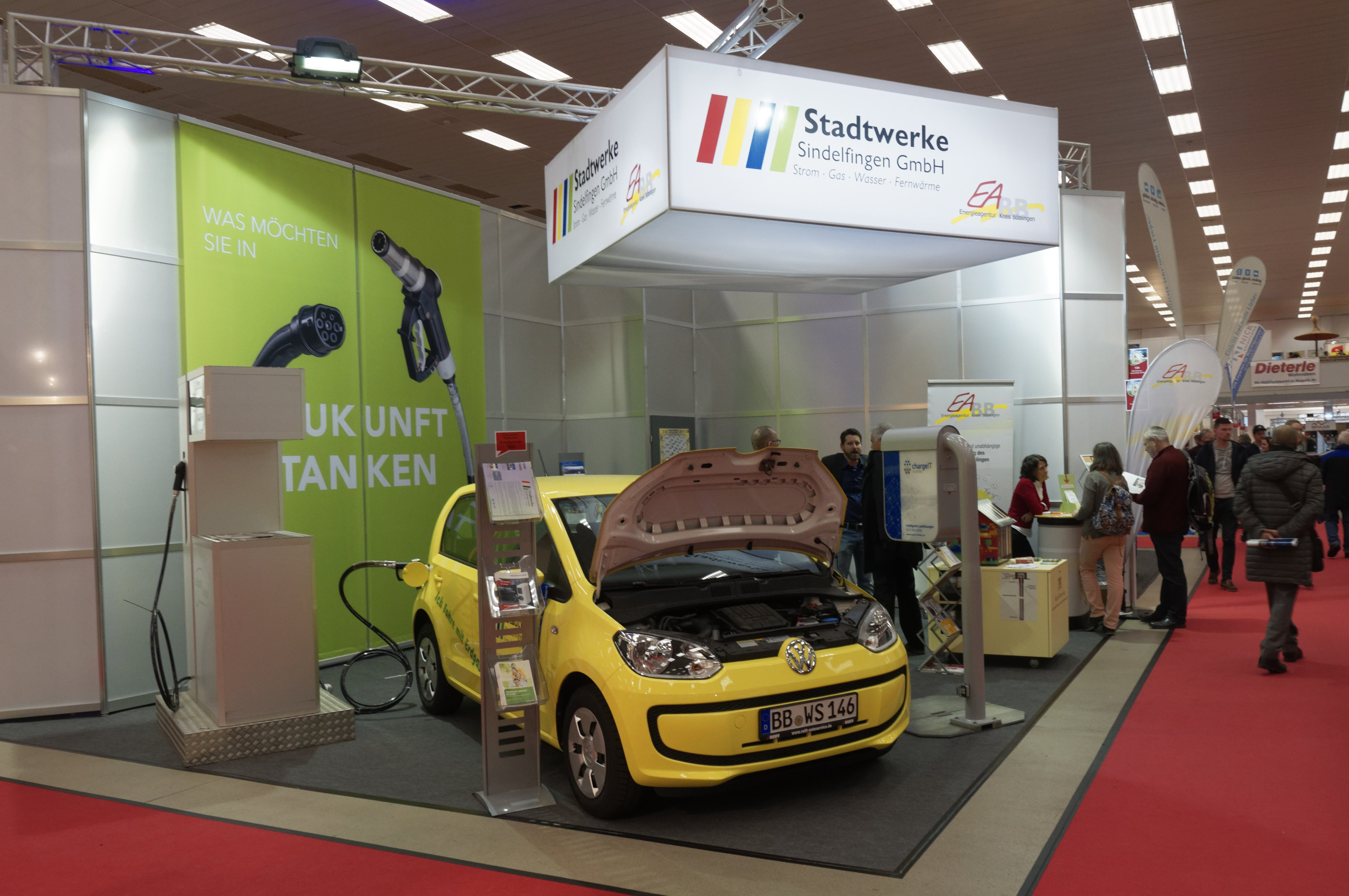 Sindelfingen Haus & Energie 2018